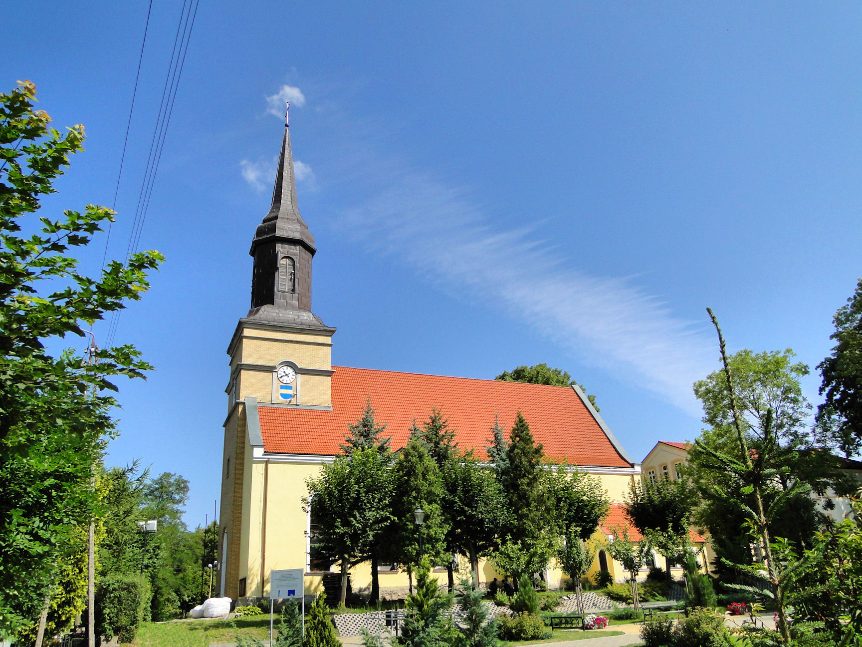 Węgorzyno, ul. Grunwaldzka - rzymskokatolicki kościół parafialny p.w. Wniebowzięcia Najświętszej Maryi Panny